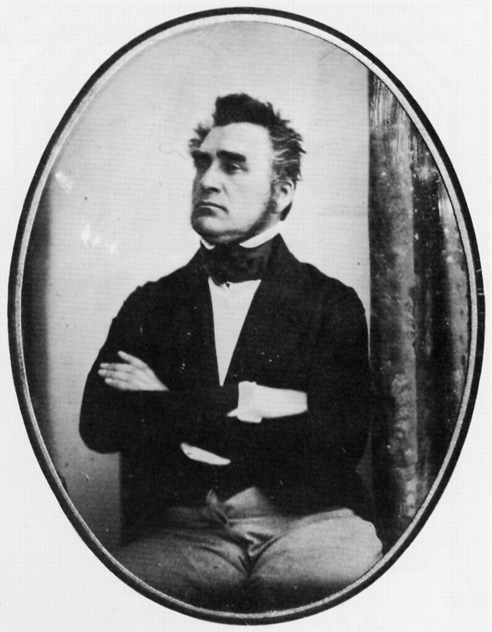 Seib, Jacob: Porträt Heinrich von Gagern